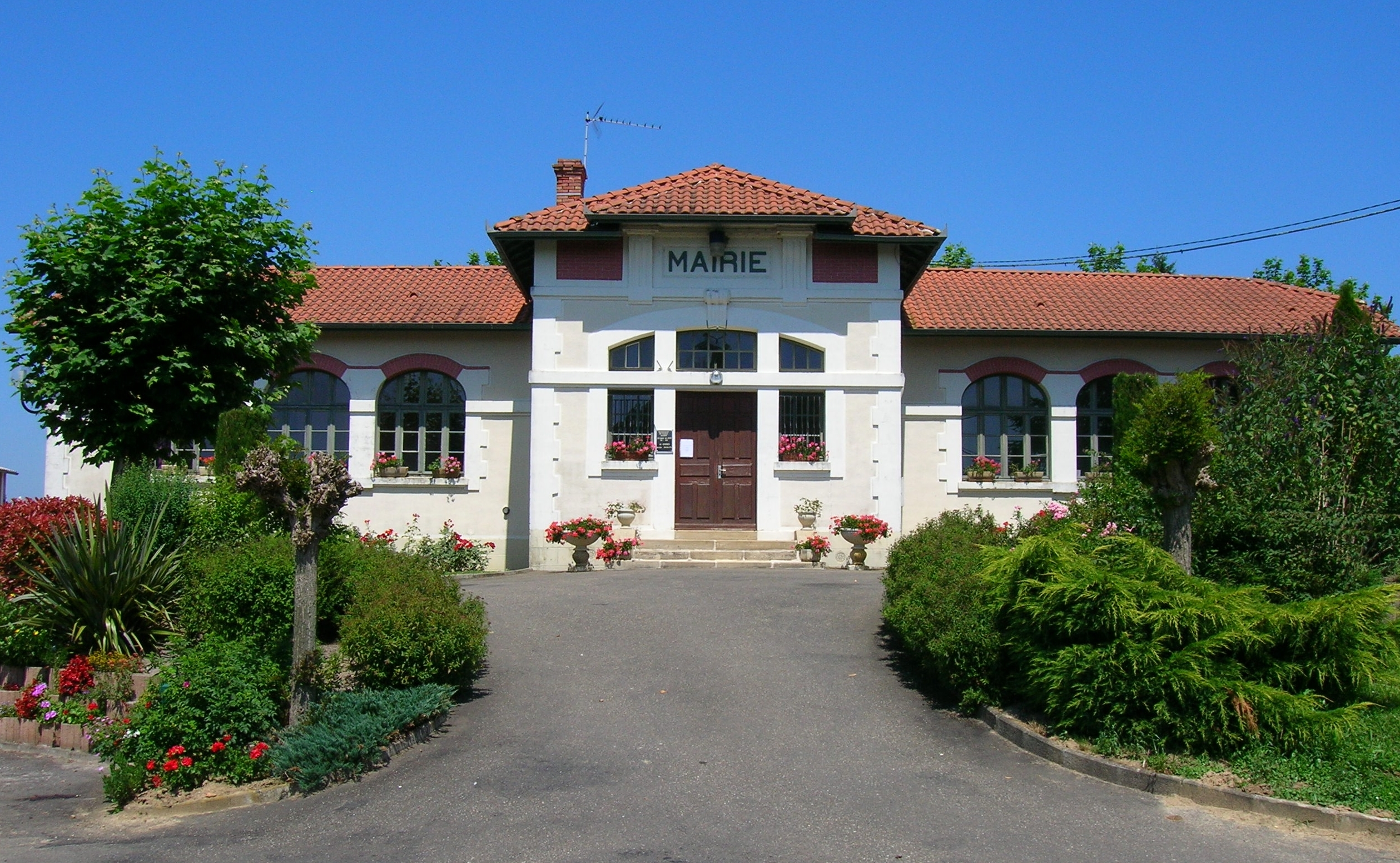 Mairie de Baigts